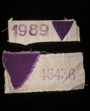 Triangulos purpura que llevaban los prisioneros Testigos de Jehová en los campos de concentración nazis